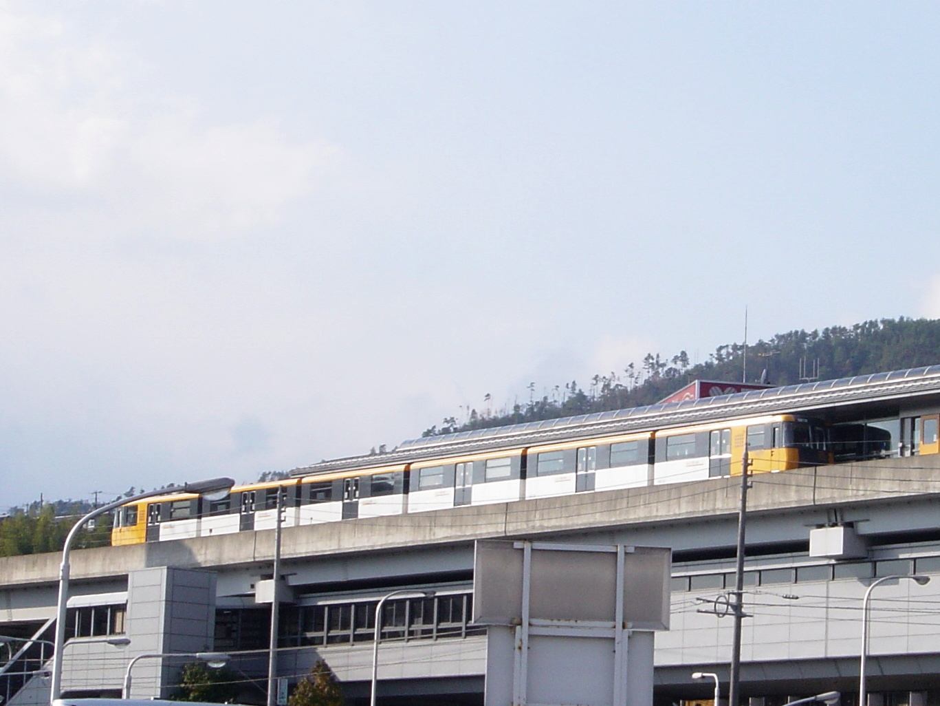 アストラムライン